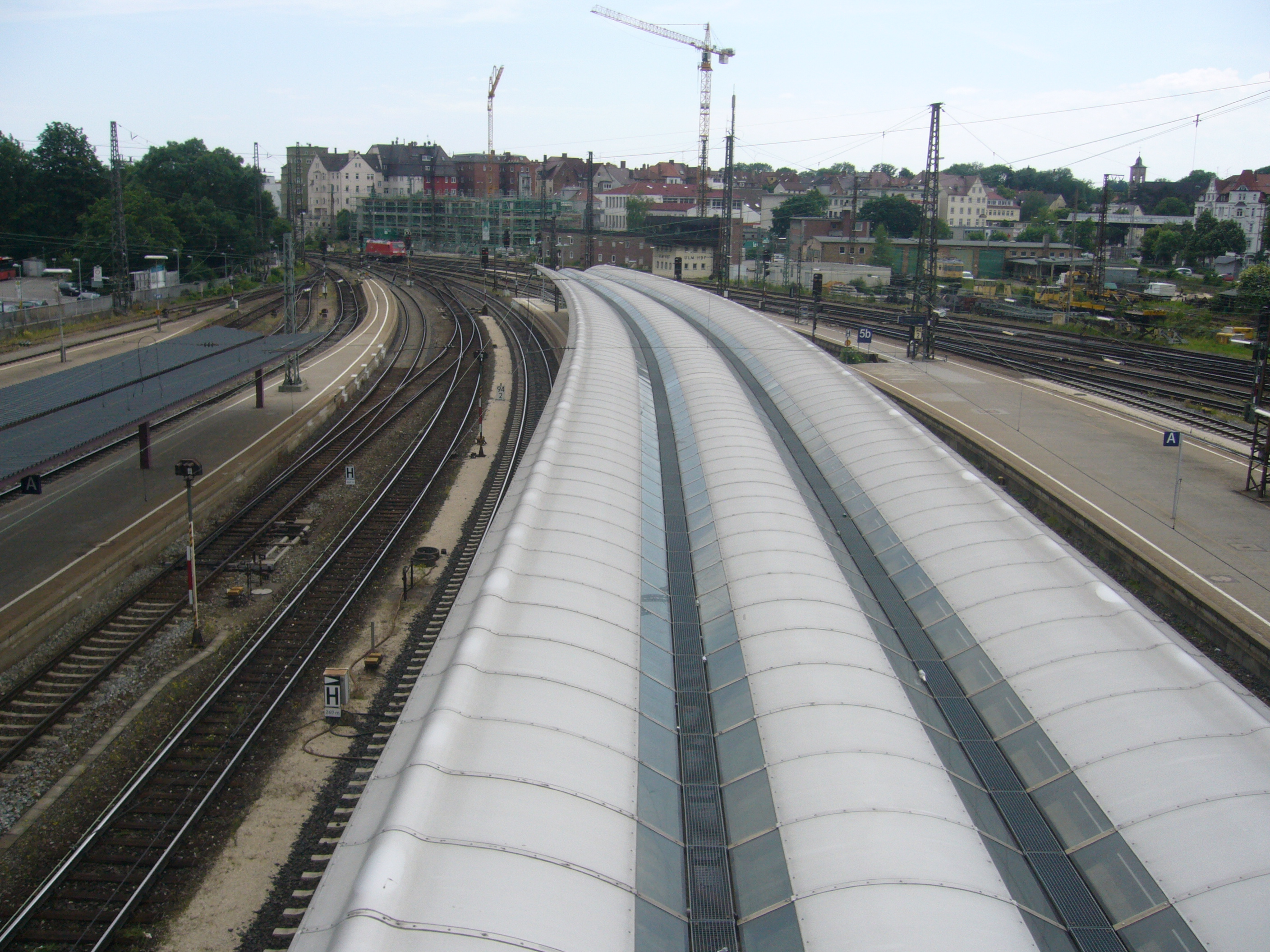 Ulmer Hauptbahnhof Sicht von der neuen Brücke - Richtung Süden